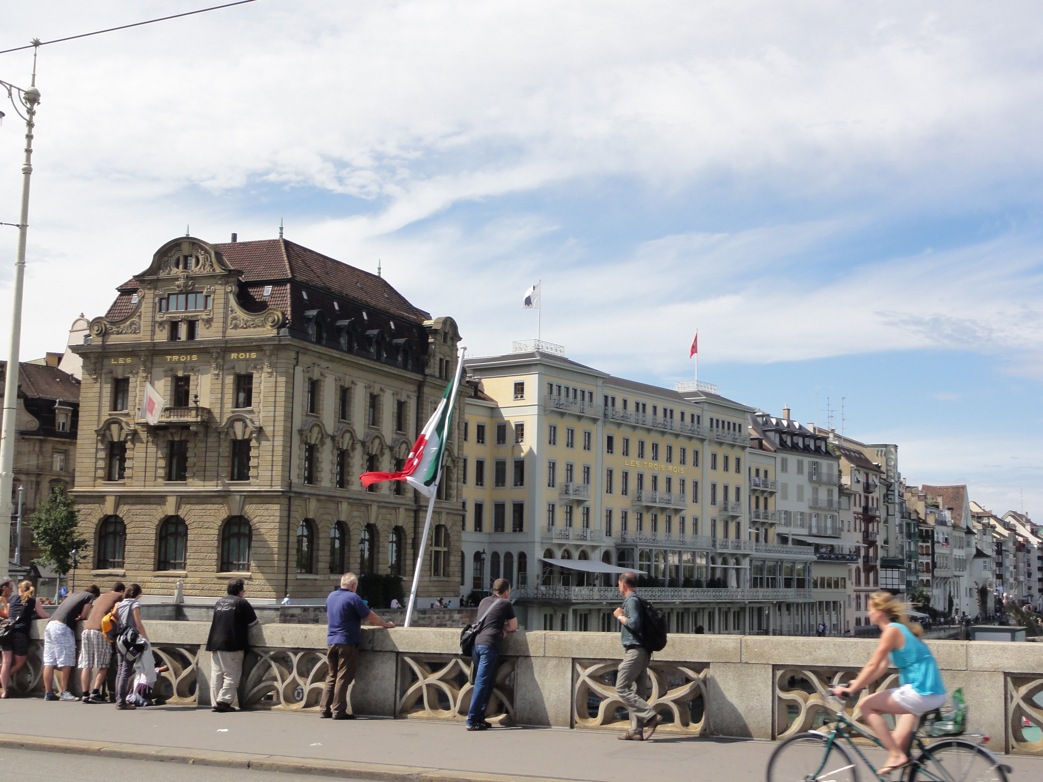 Basel BS — Les Trois Rois, von der Mittleren Brücke gesehen Info GPS data may be inaccurate. EXIF data regarding date and time may be inaccurate.